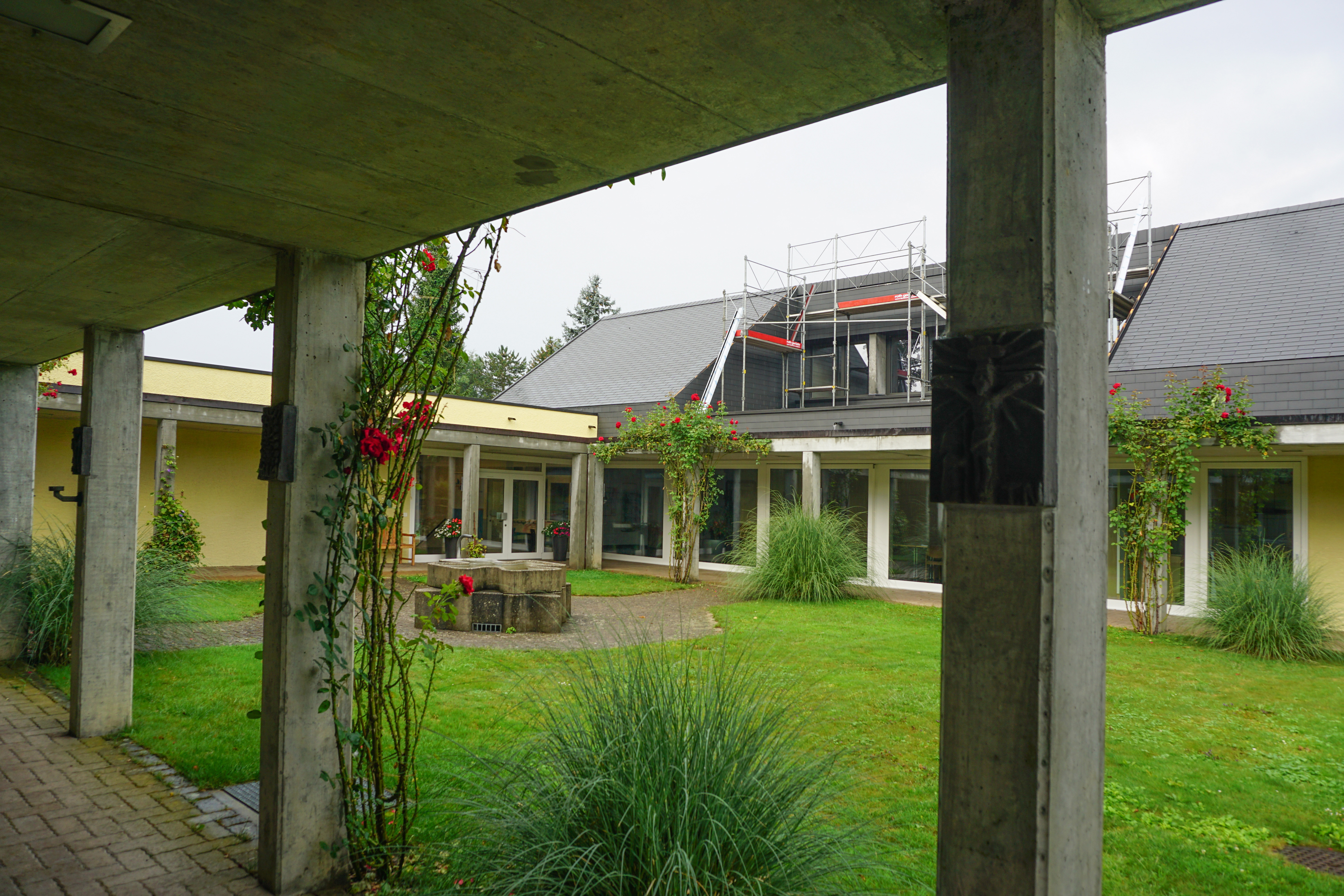 Kirche, Hof mit umlaufender Galerie (Temporäres Gerüst für Dachdecker.)